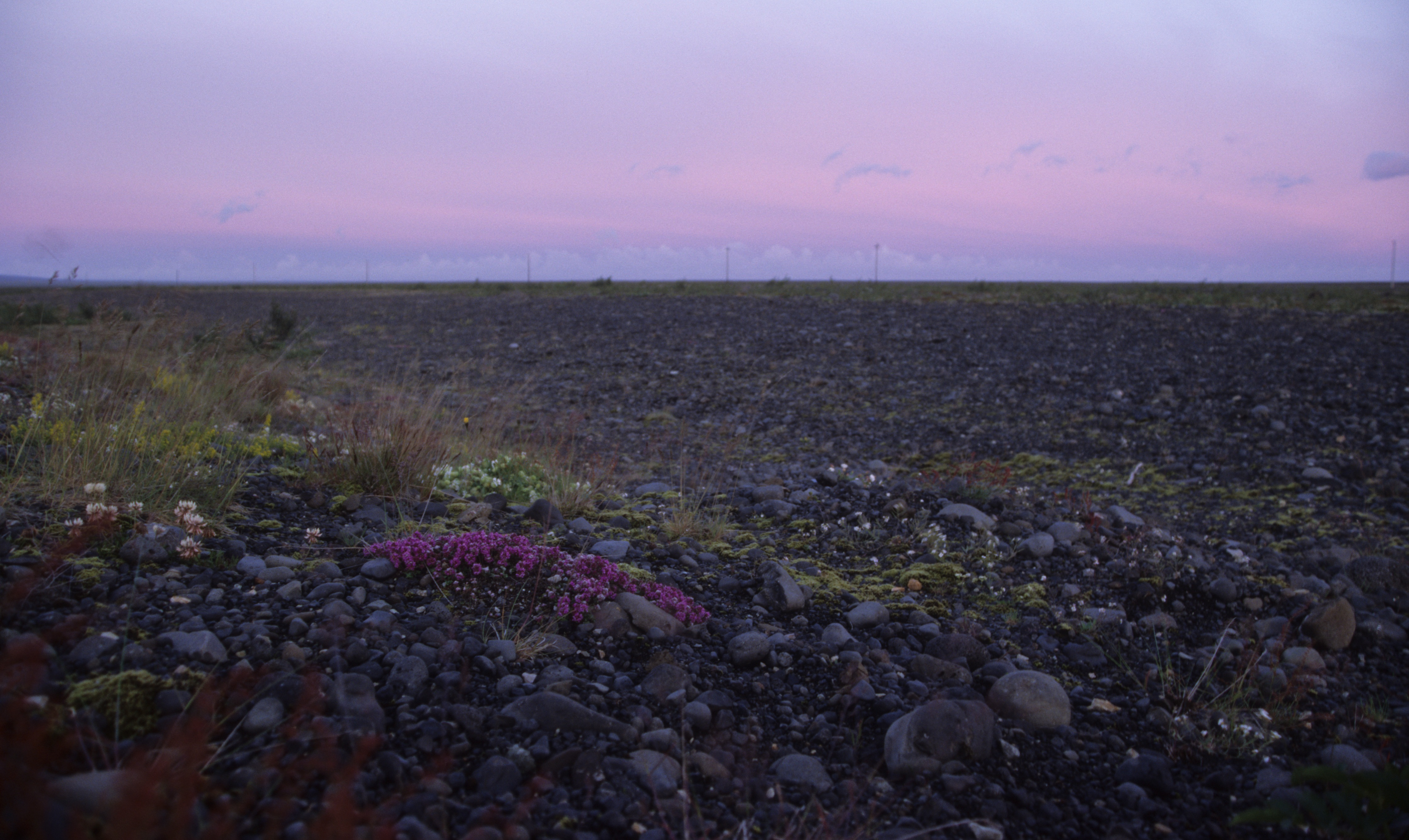 Geröll-"Wüste" vor Skaftafell